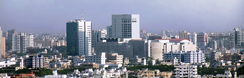 Dhaka Skyline